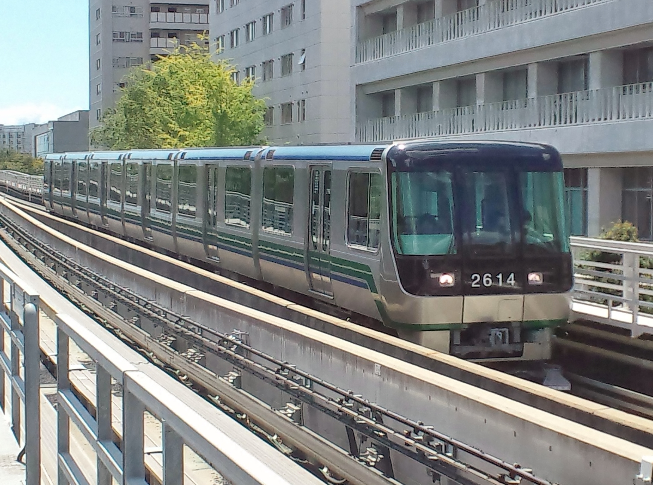 神戸新交通(ポートライナー)2000型14編成(1次車)車両の全体写真。みなとじま駅1番線より撮影。車両は2番線11時9分発普通三宮行き